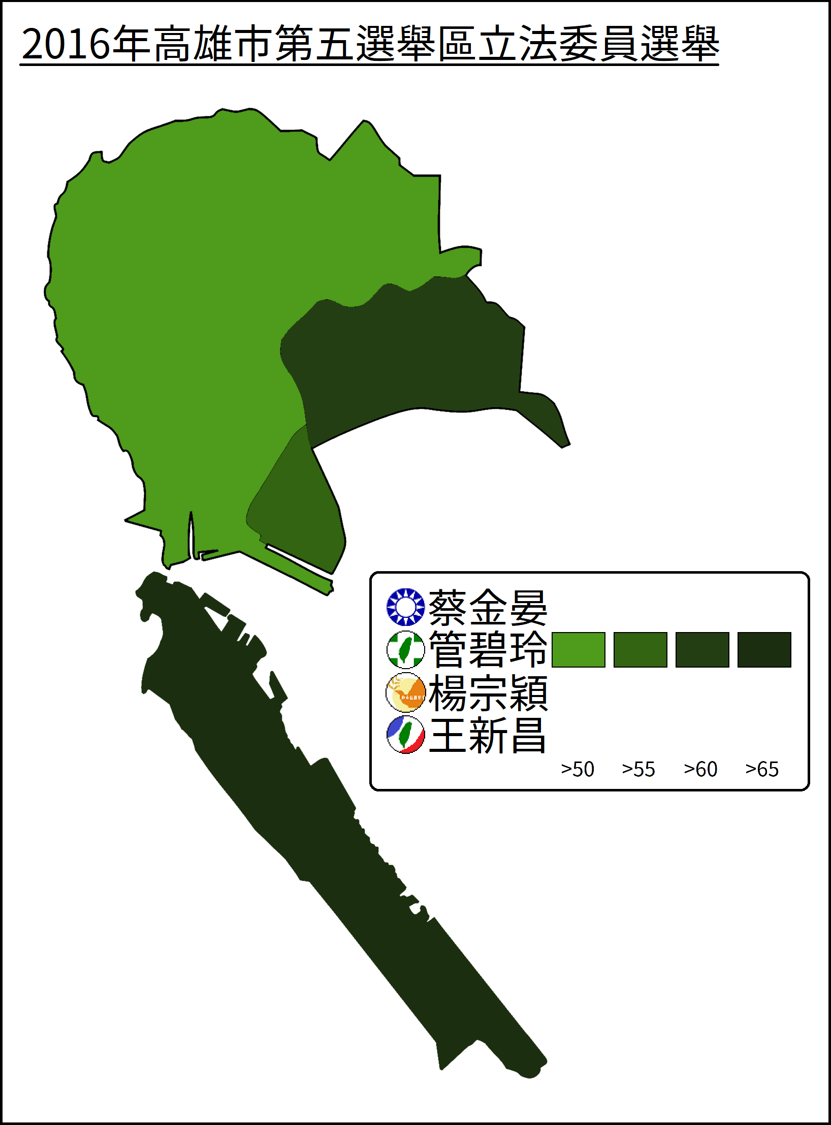 2016年立法委員選舉高雄市第五選舉區